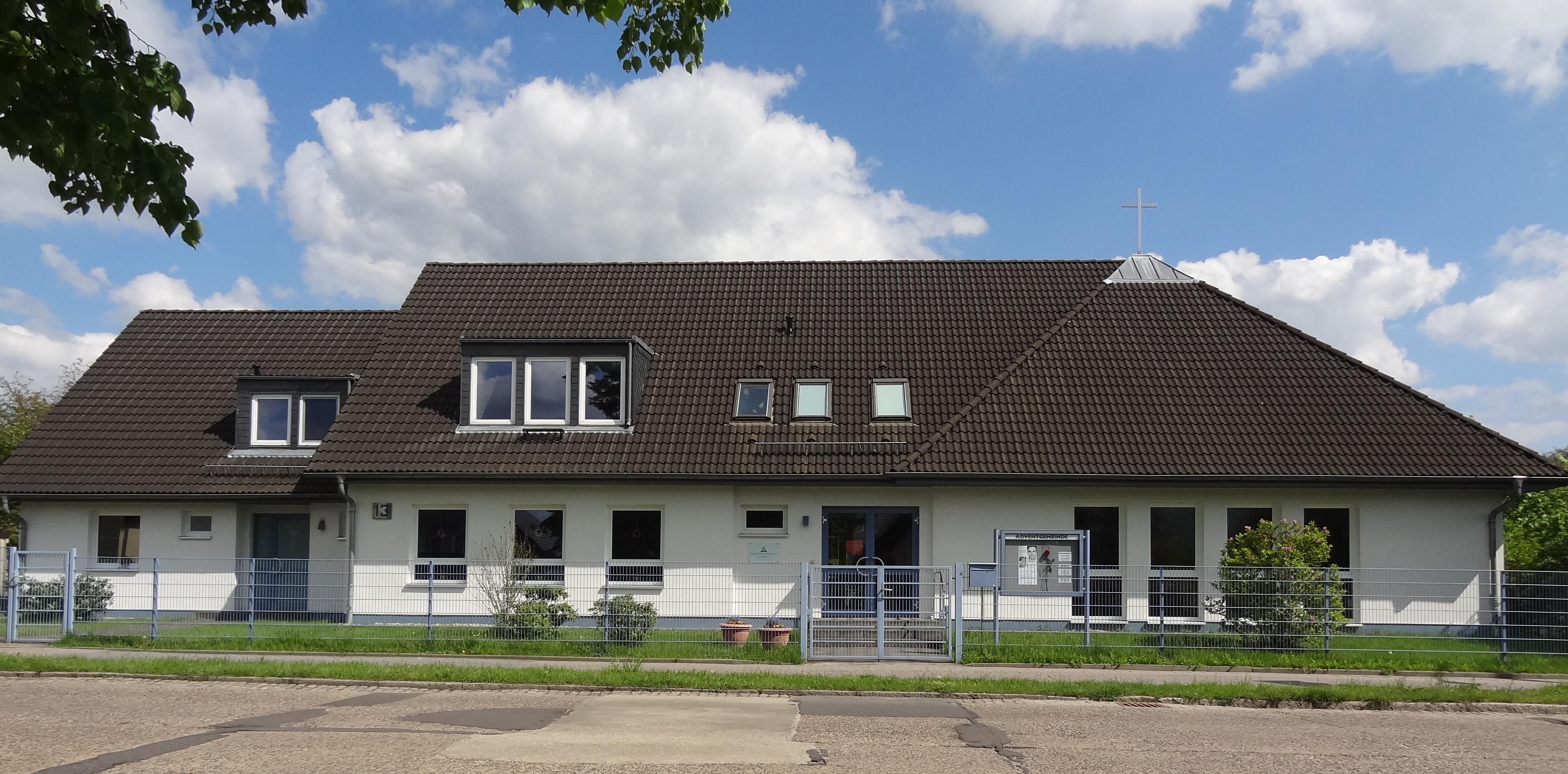 Gemeindehaus der Siebenten-Tags-Adventisten, Gaglower Str. 13, 03046 Cottbus (Land Brandenburg)